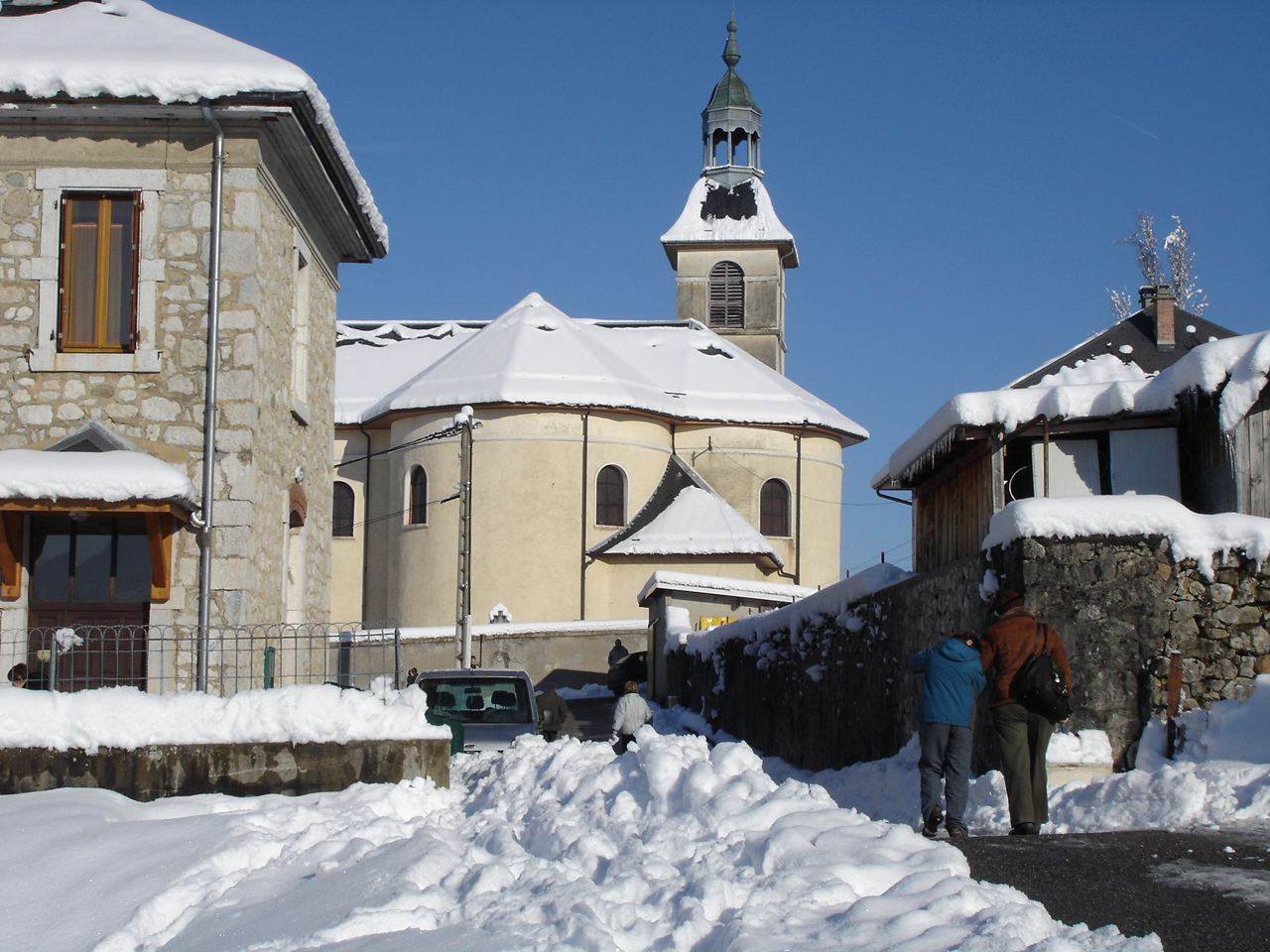 En sortant de l'école, une vue de l'église, en hiver 2008